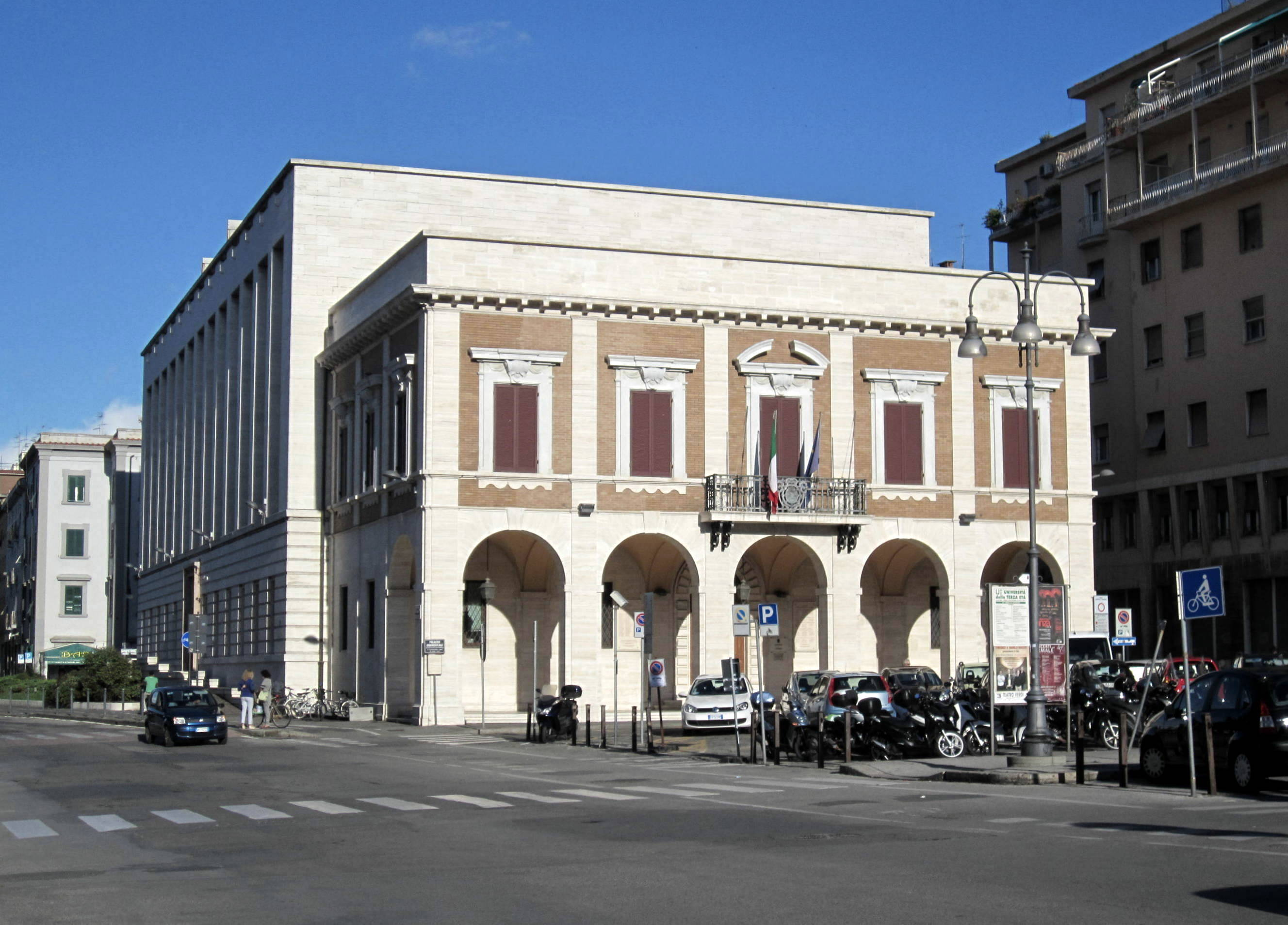 Palazzo Granducale a Livorno